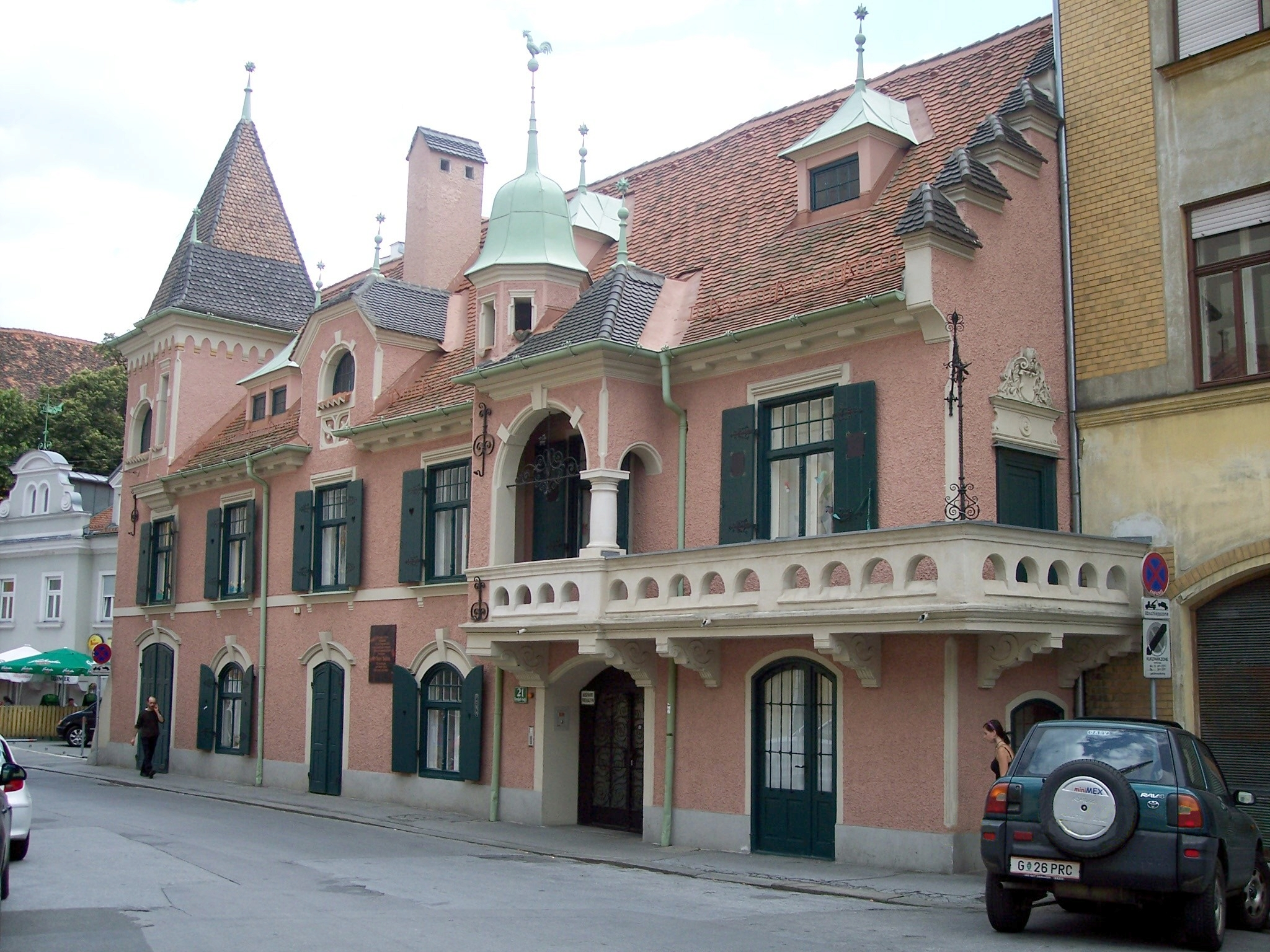 Sogen. Böhm-Schlössl (nach: Dirigent Karl Böhm), in Graz Gries, Kernstockstraße 21.